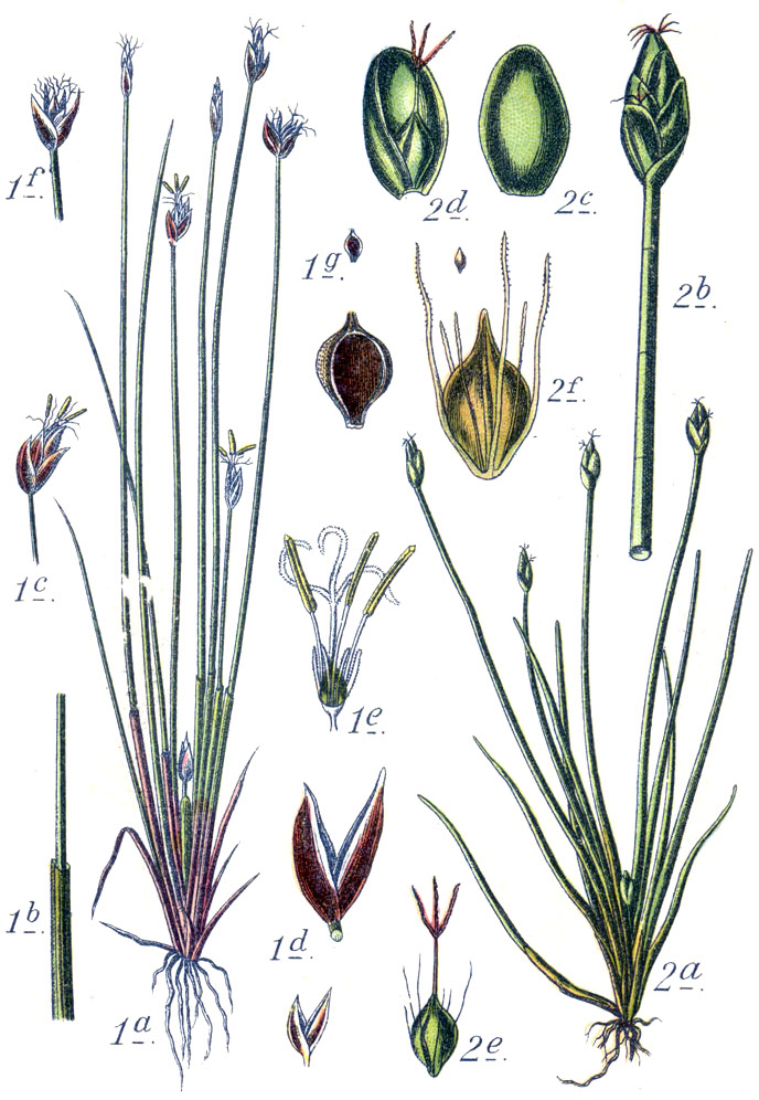 1. Eleocharis quinqueflora (Hartmann) O.Schwarz, syn. Cyperus pauciflorus (Lightf.) Missbach & E.H.L.Krause, nom. ill. 2. Eleocharis parvula (Roem. & Schult.) Link ex Bluff, Nees & Schauer, syn. Cyperus parvulus (Roem. & Schult.) Missbach & E.H.L.Krause, nom. ill. Original Caption 1. Torf-Simse, Cyperus pauciflorus 2. Zwerg-Simse, C. parvulus